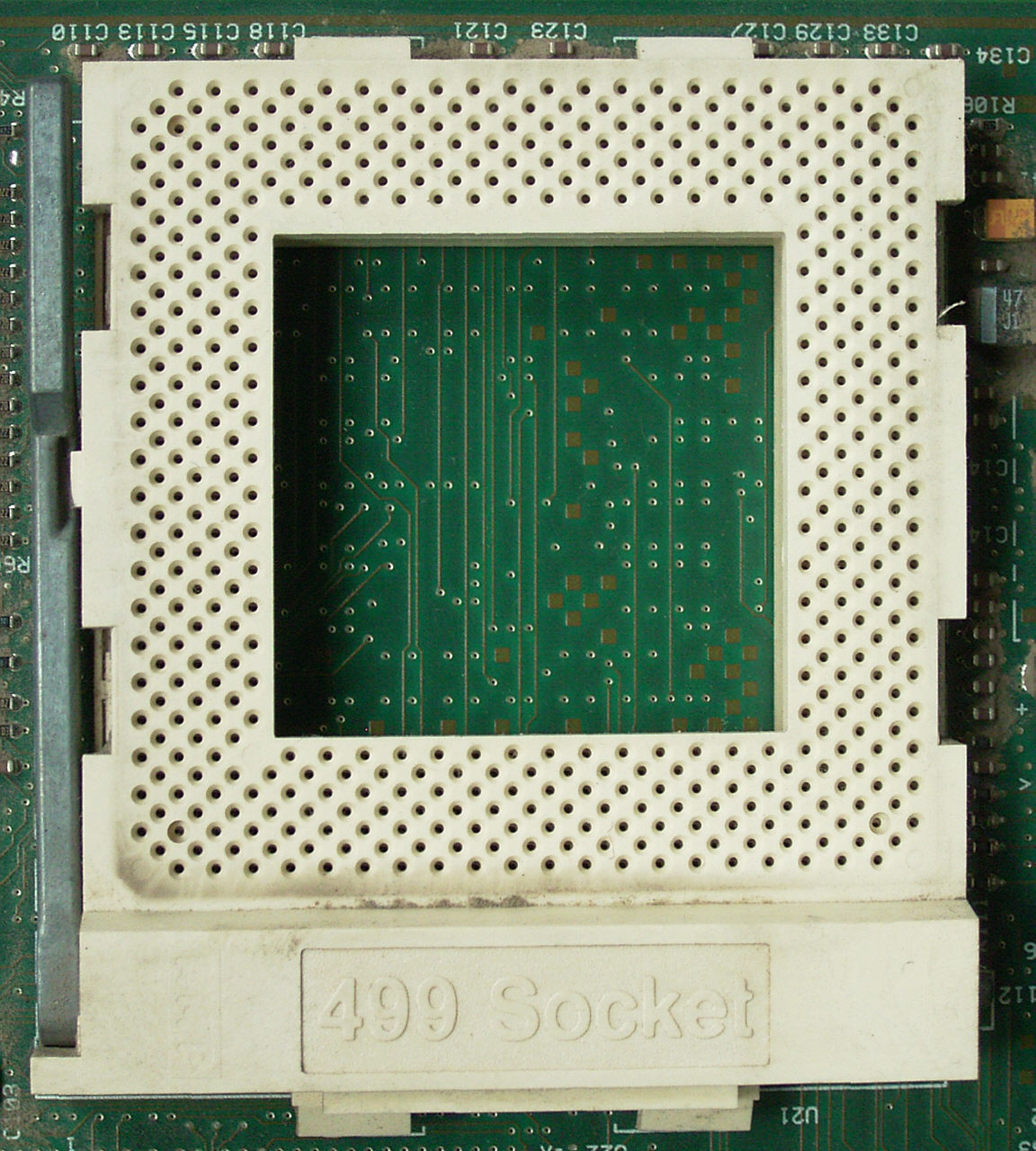 CPU-Sockel 499 für DEC Alpha